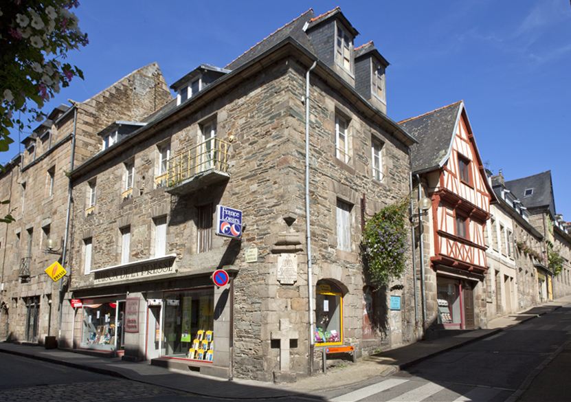 Lieu où mourut le chevalier de Pont-Blanc en 1346 et plaque commémorative.